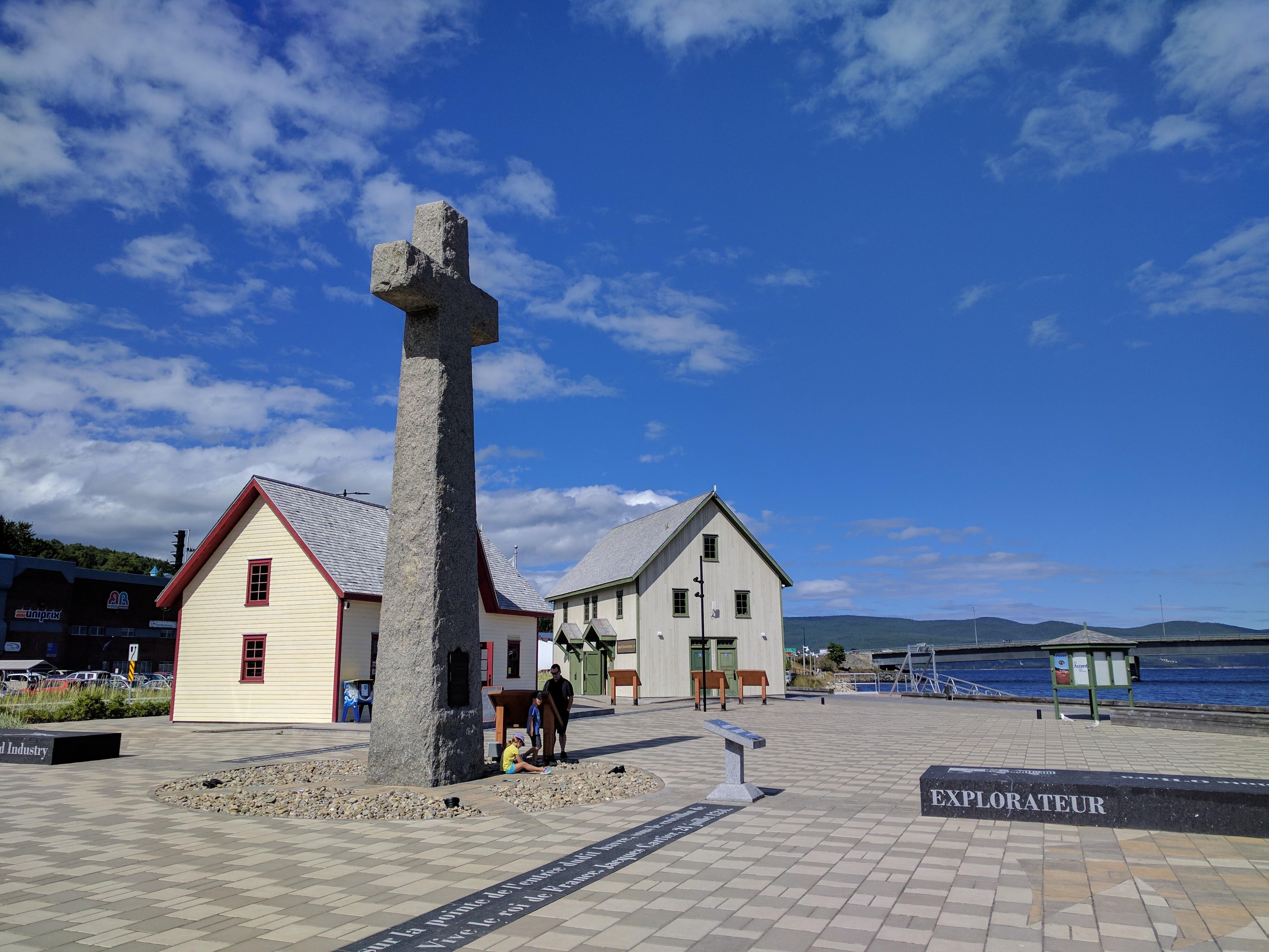 Gaspé, Quebec